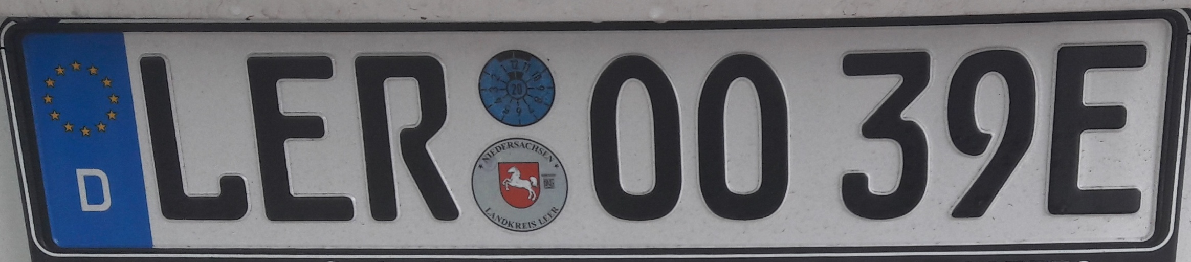 Duits kentekenplaat voor elektrische auto's met een E erachter